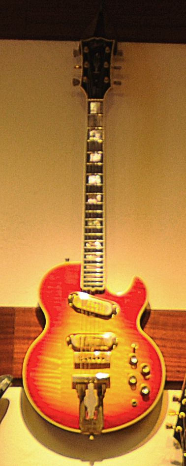 Gibson L5-S Rumble Seat Music Vintage Guitars - Carmel, CA